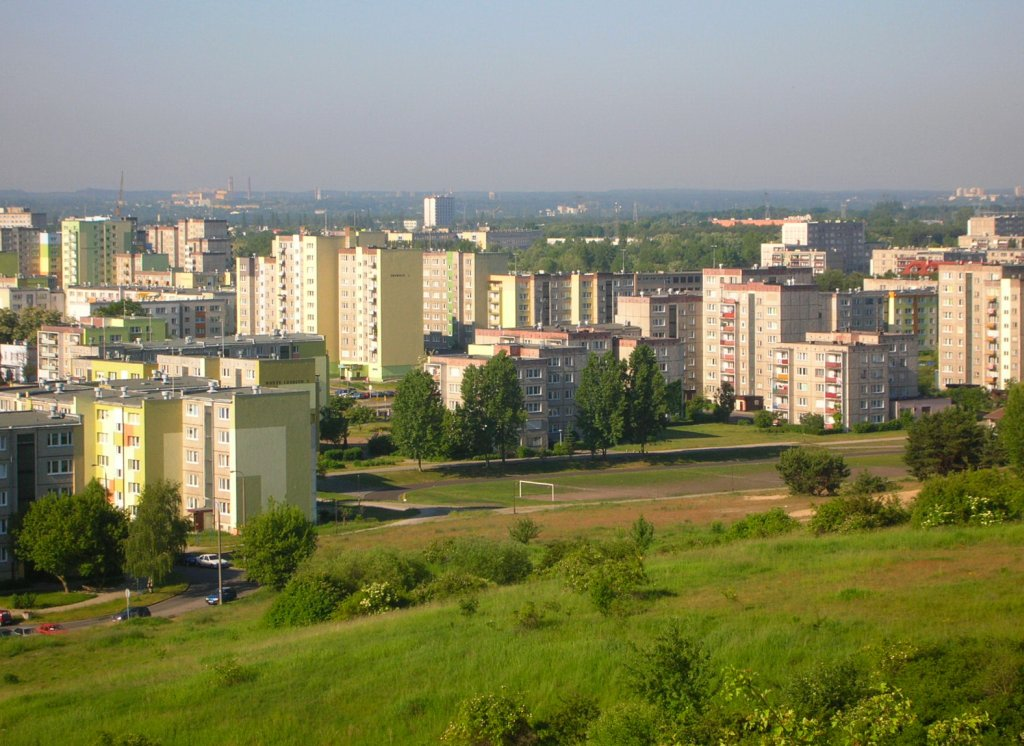 Widok os. Bohaterów w Fordonie